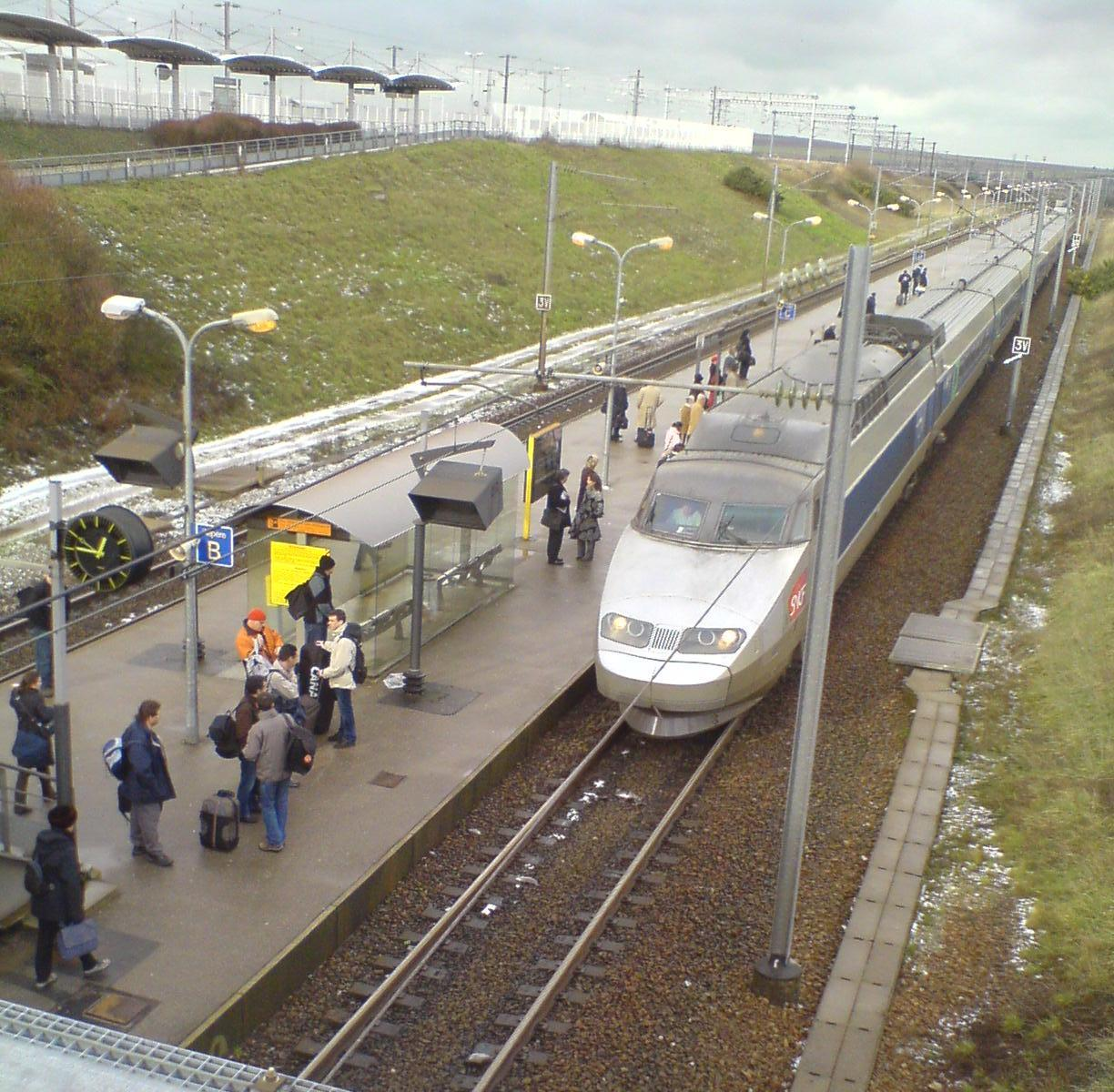 TGV-PSE entrant en gare de Calais-Fréthun.